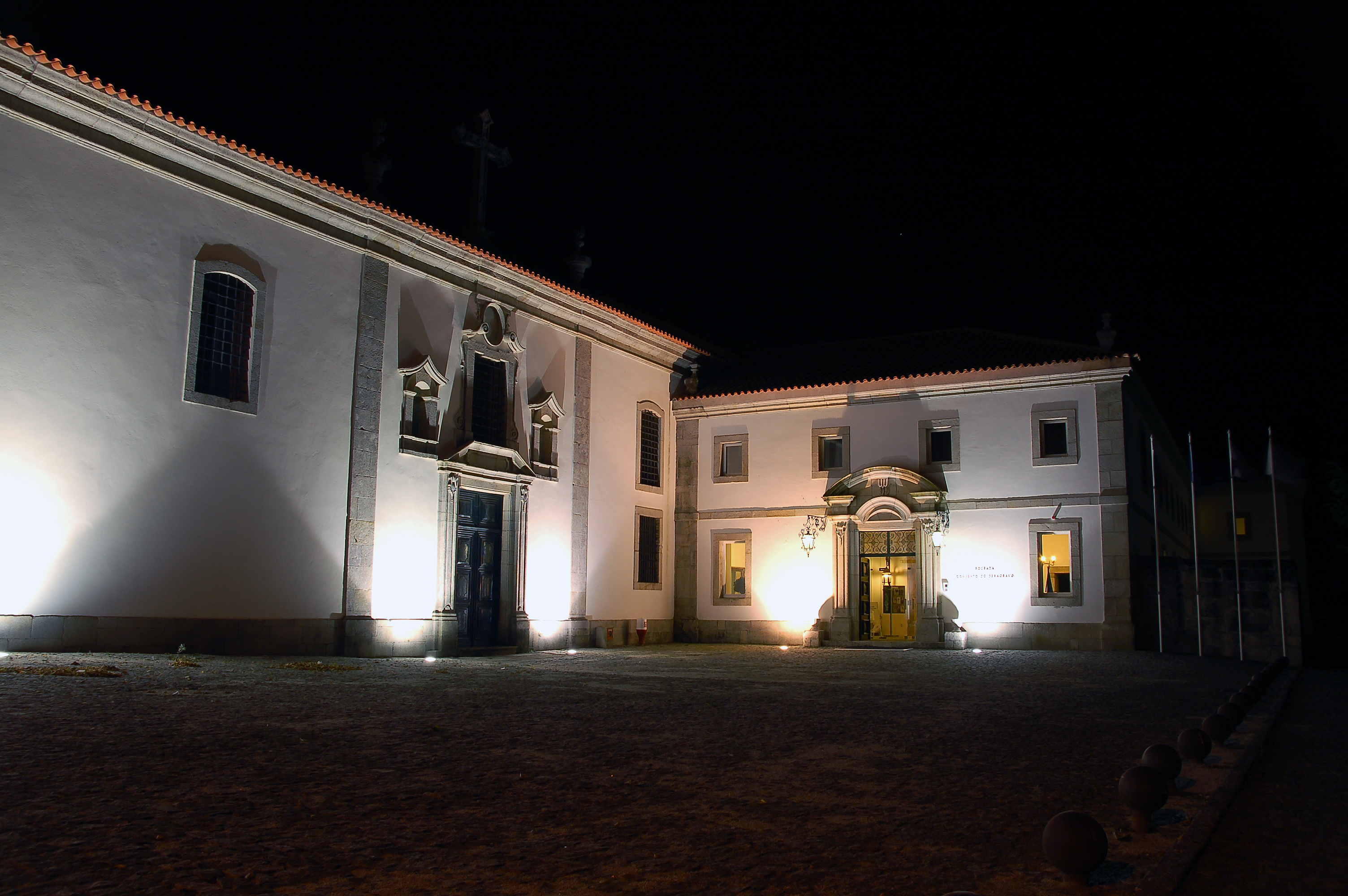 Convento do Desagravo do Séc.XVIII e está localizado perto da Serra da Estrela e Serra do Açôr c/ ambiente romântico e tranquilo.